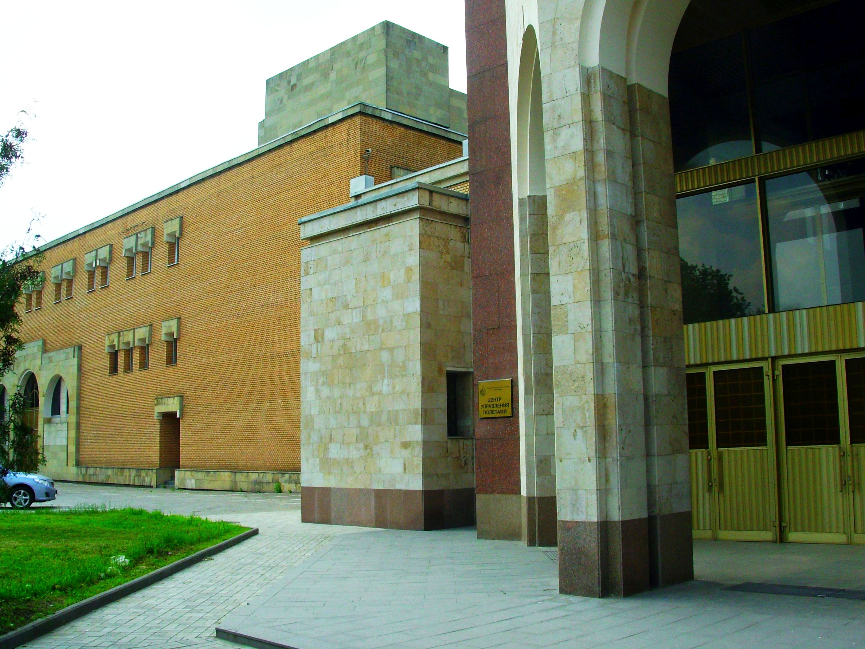 Город Королёв, улица Пионерская, дом 4А, ЦНИИМаш, Центр управления полётами (ЦУП)